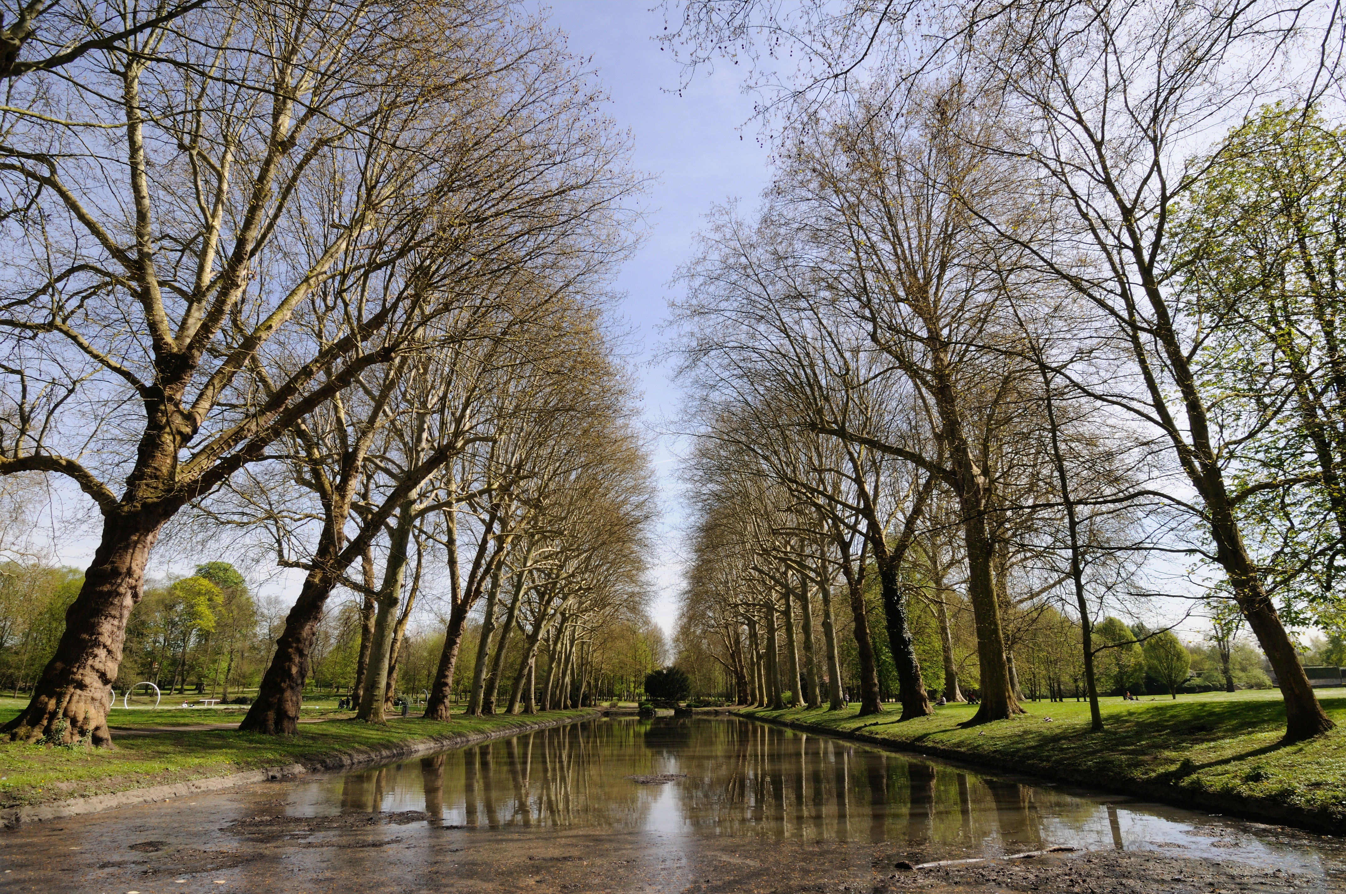 Abbaye de Maubuisson - platanes